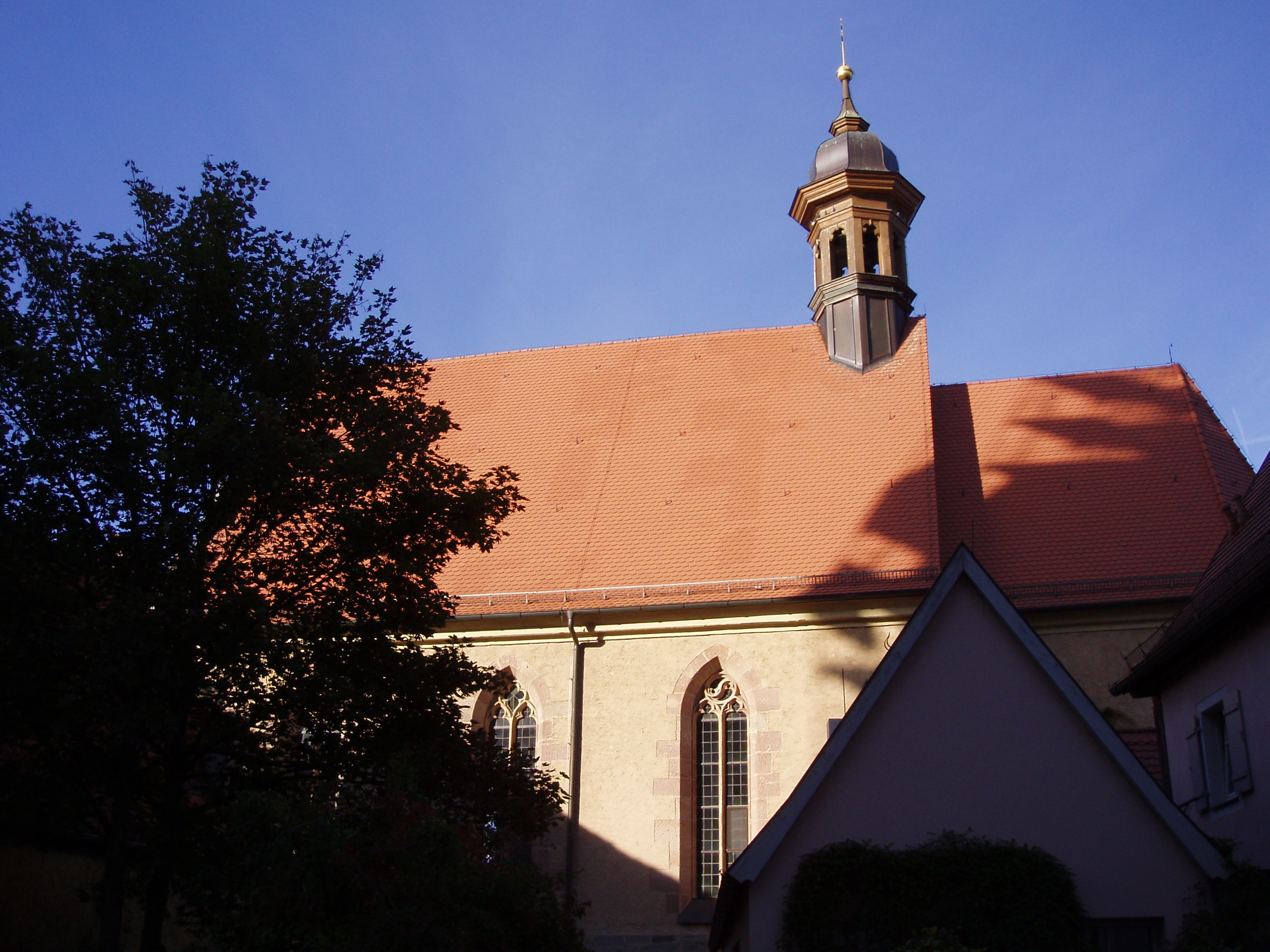 Liebfrauenkirche Herrieden